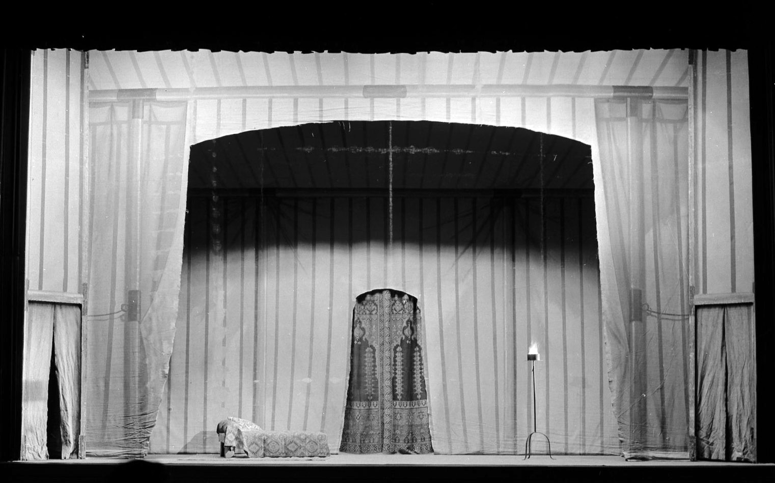 Théâtre du Capitole. Le 1 Mars 1968. Vue des décors des Pêcheurs de perles au théâtre du Capitole.